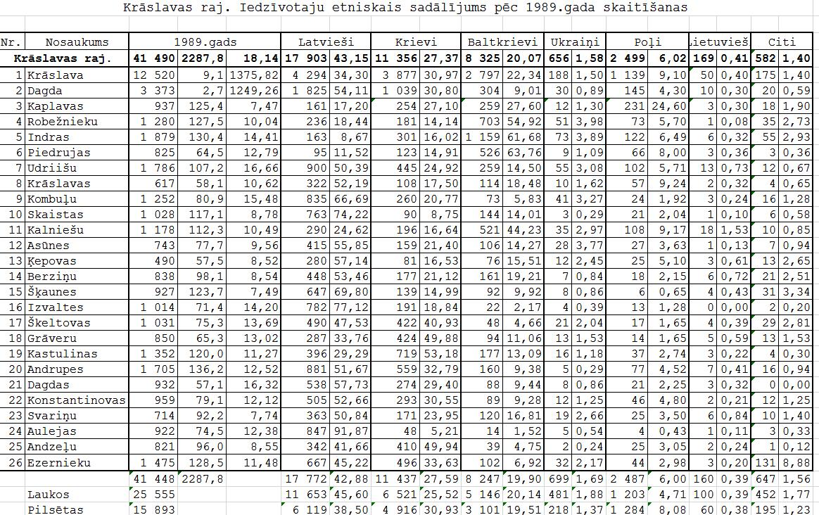 Этнический состав населения Латвии по переписи 1989 года